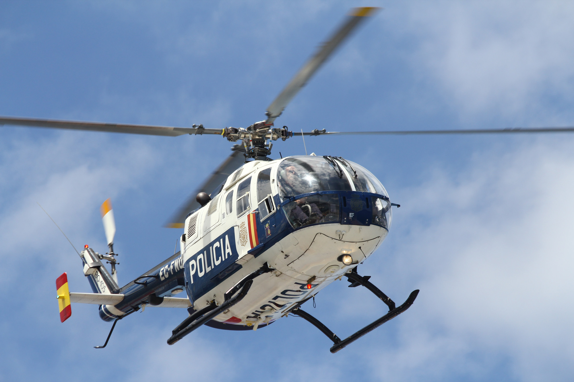 Del 22 al 28 de junio de 2012 se celebran en Vigo unas Jornadas Policiales, que incluyen una exposición del Cuerpo Nacional de Policía en la Estación Marítima de la ciudad. Las Jornadas se iniciaron con un simulacro de operación antiterrorista en el muelle de la Estación Marítima. El simulacro contó con la participación de tres miembros del Grupo de Operaciones Especiales y Seguridad (GOES) de Galicia, coches patrulla, el helicóptero de la Policía basado en el Aeropuerto de Peinador (que llevó en su puerta de babor a un tirador de élite del GOES para apoyar la operación), una unidad de guías caninos y agentes del Grupos de Desactivación de explosivos y NRBQ, con un vehículo de desactivación. Vigo Police Conference, 22-28 June 2012 From 22th to 28th June 2012 held a Police conference in Vigo, including an exhibition of the National Corp of Police in the Maritime Station of the city. The conference began with a simulation of anti-terrorist operation in the dock of the ferry terminal. The simulation was attended by three members of the Special Operations and Safety Group (GOES) of Galicia, patrol cars, the police helicopter based at the Peinador Airport (carrying an elite shooter of the GOES to support the operation), a unit of dog handlers and agents of the Explosive Ordnance and NRBQ Group, with a deactivation vehicle.